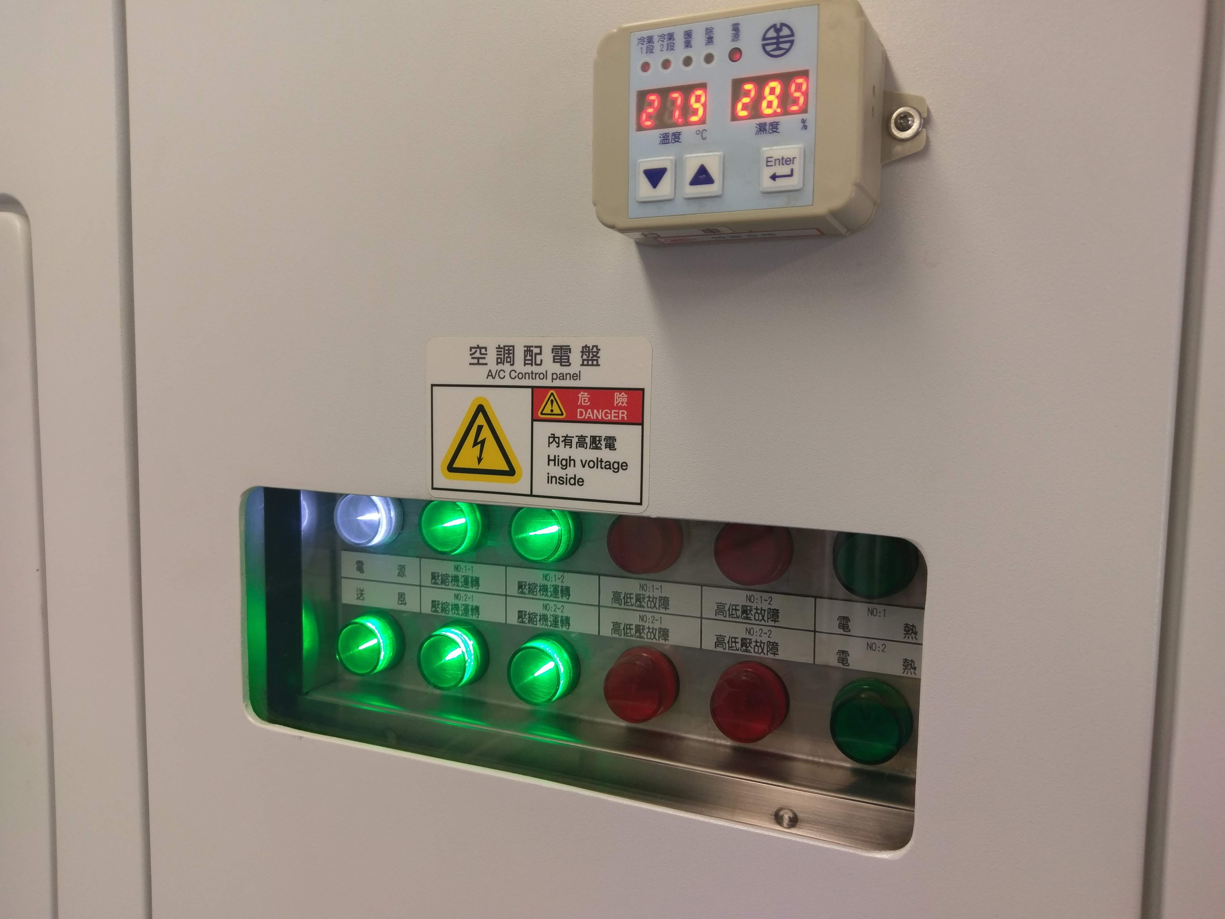 中文（台灣）: 台鐵EMU800型電聯車車內的空調機配電盤